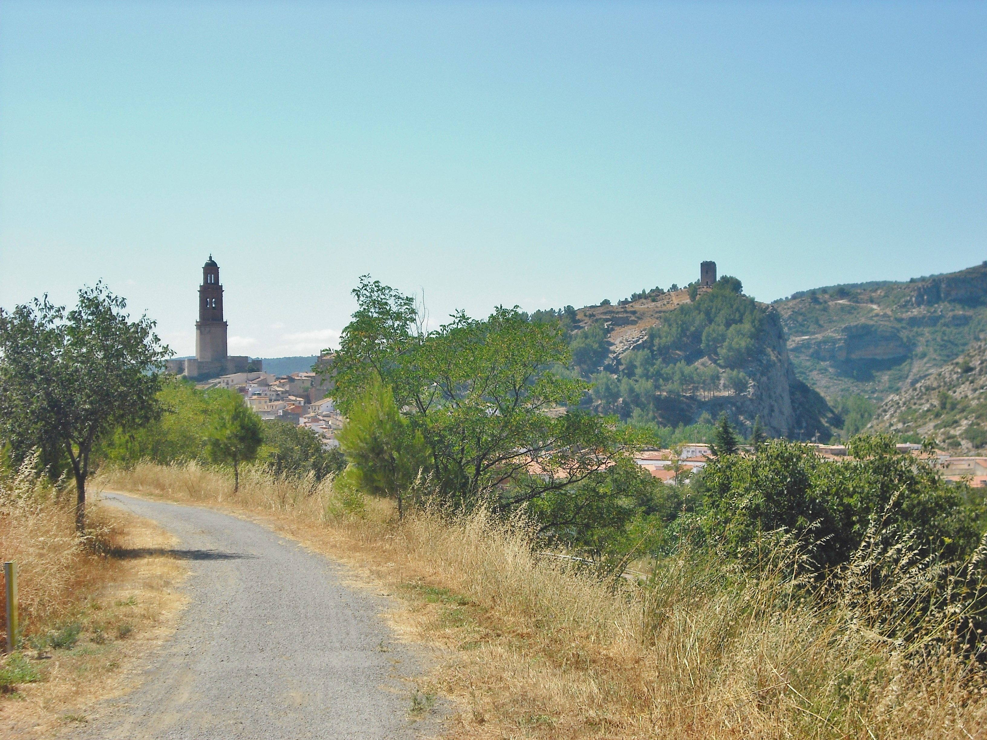 Xèrica.